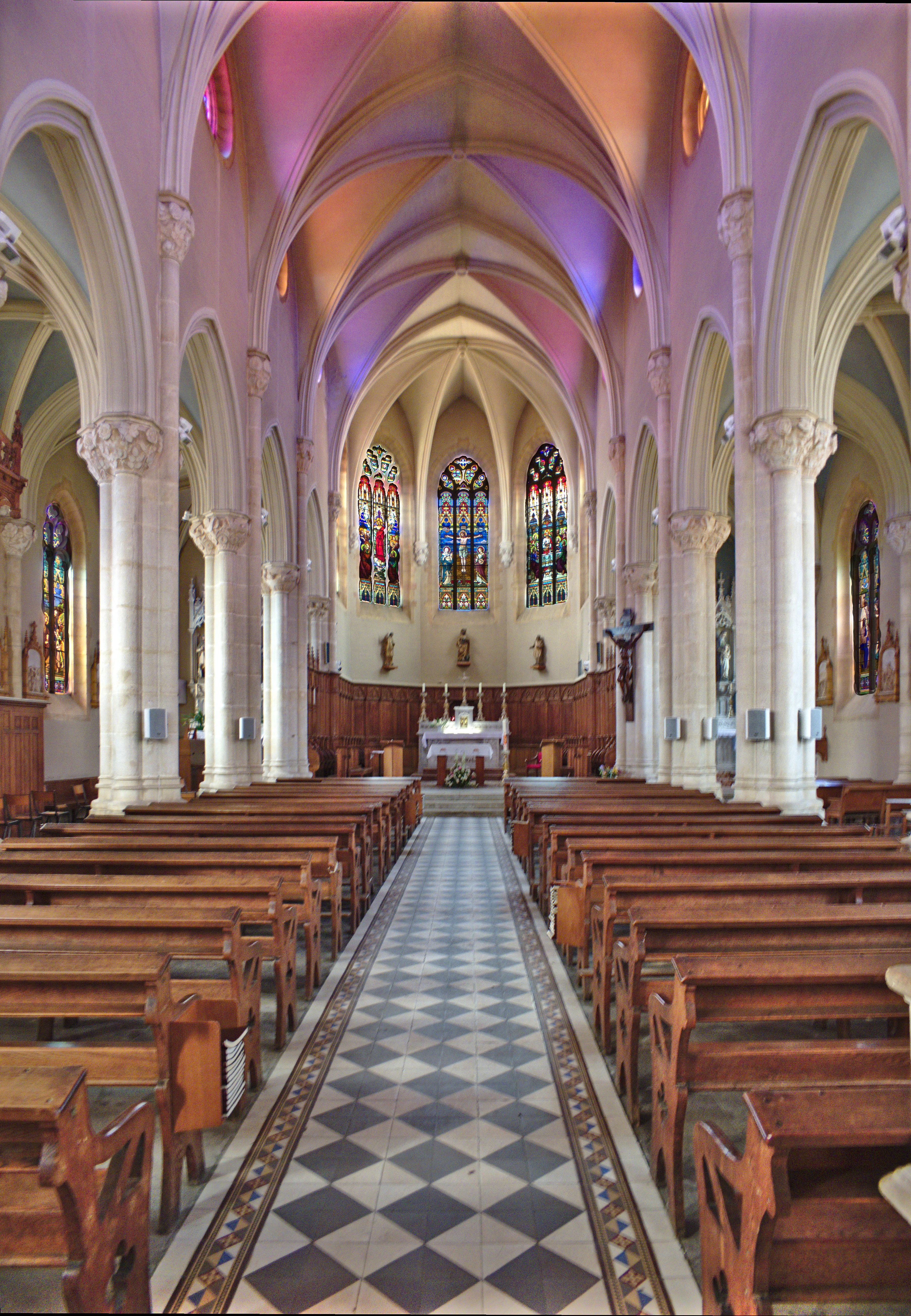 Eglise de Theizé